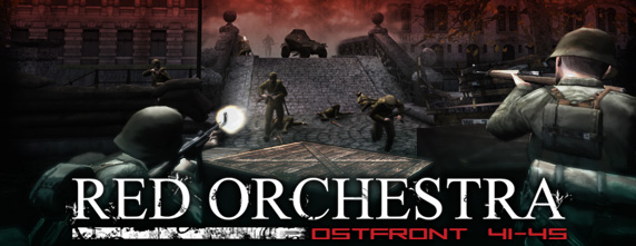 Red Orchestra Banner